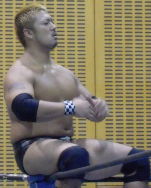 火野裕士 2010年8月15日 KAIENTAI-DOJO千葉ポートアリーナ大会 投稿者撮影